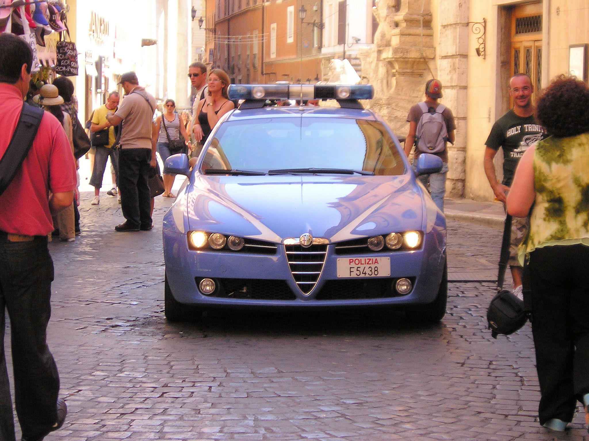 Polizia di Stato (Alfa Romeo 159).